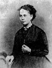 Vera Ivanovna Kornilova Griboedova (1848-1873)